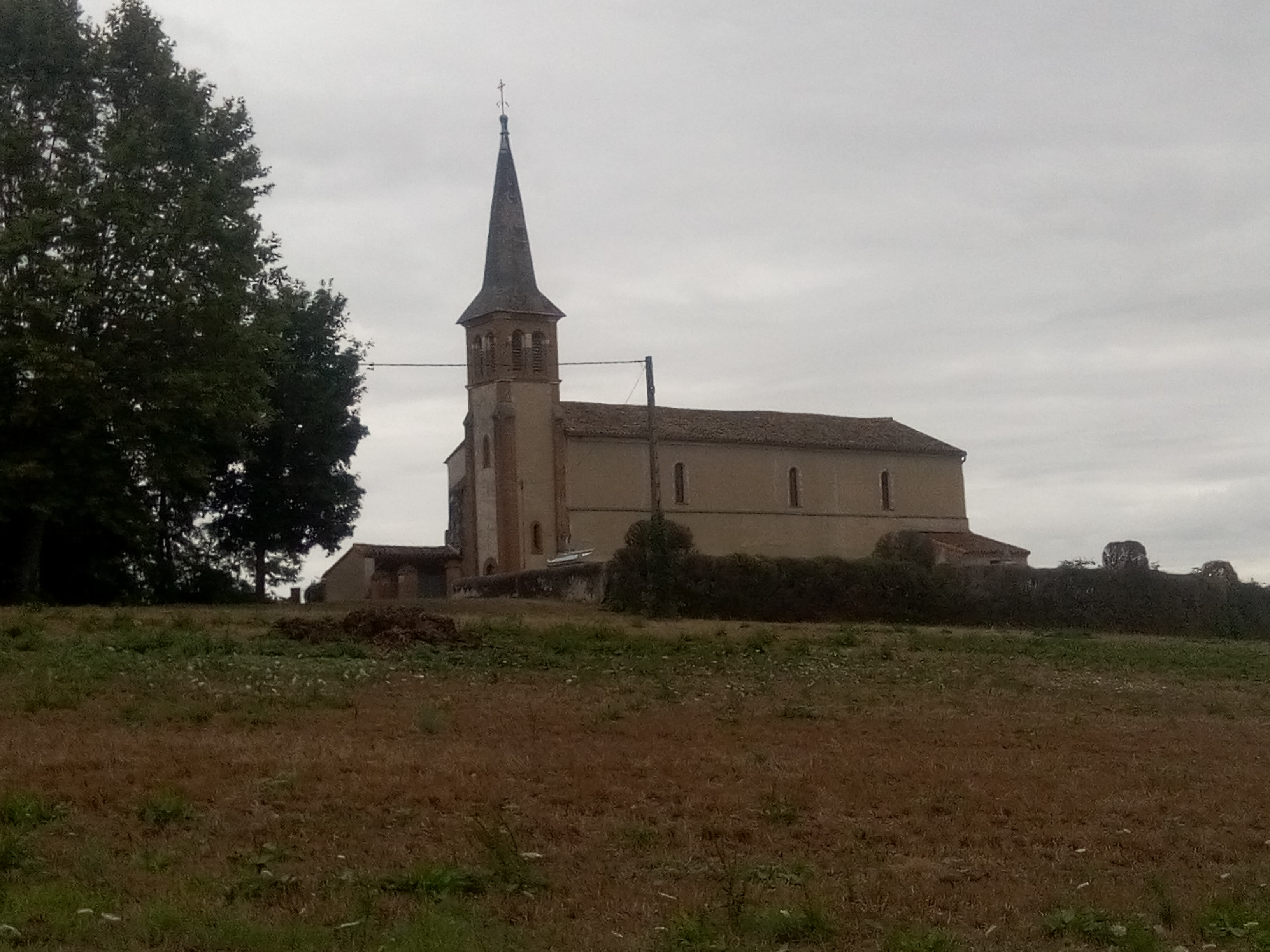 Église de Fornex